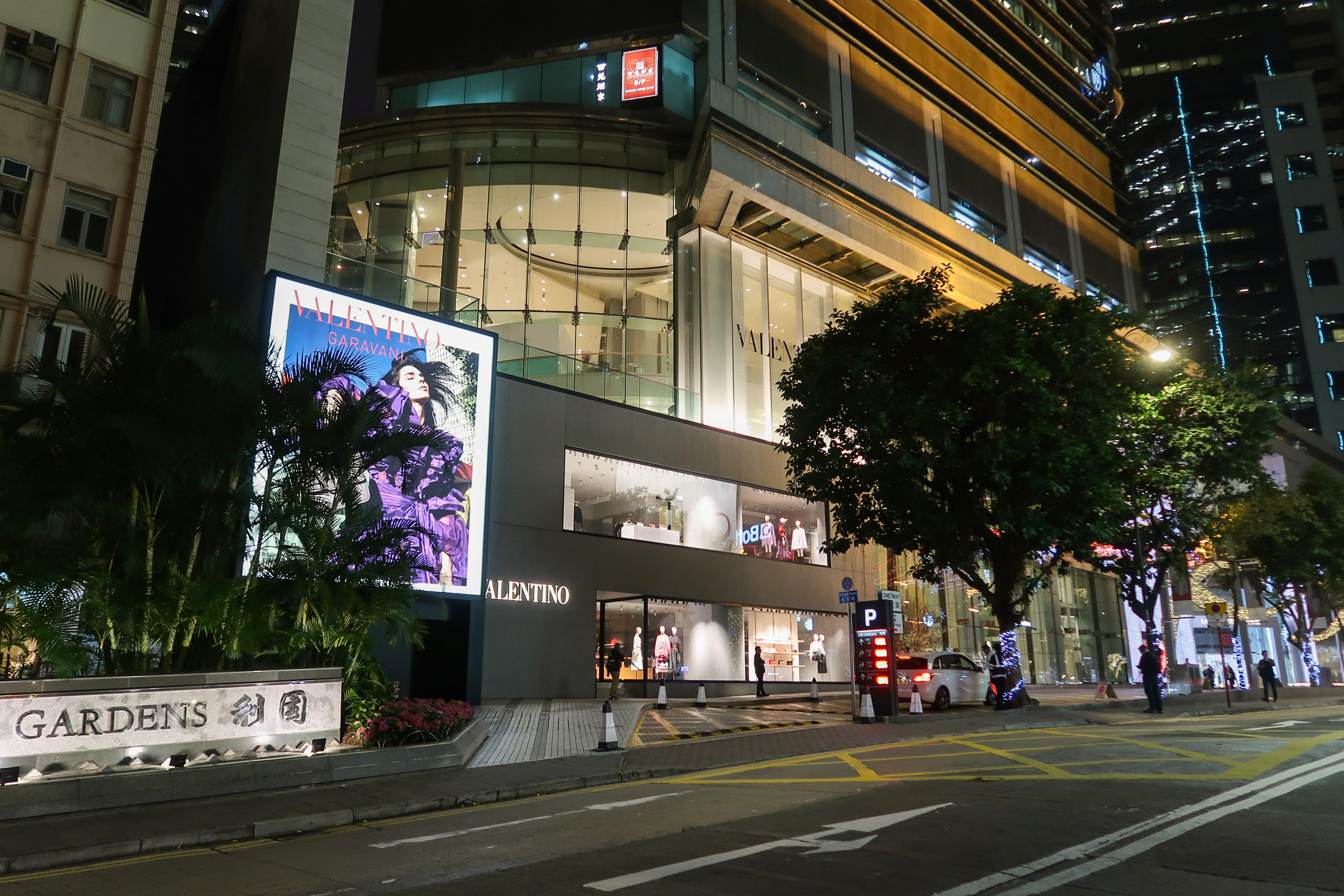 Lee Garden One